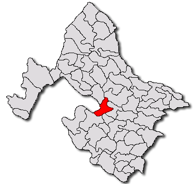 Categorie:Hărţi ale judeţului Mehedinţi